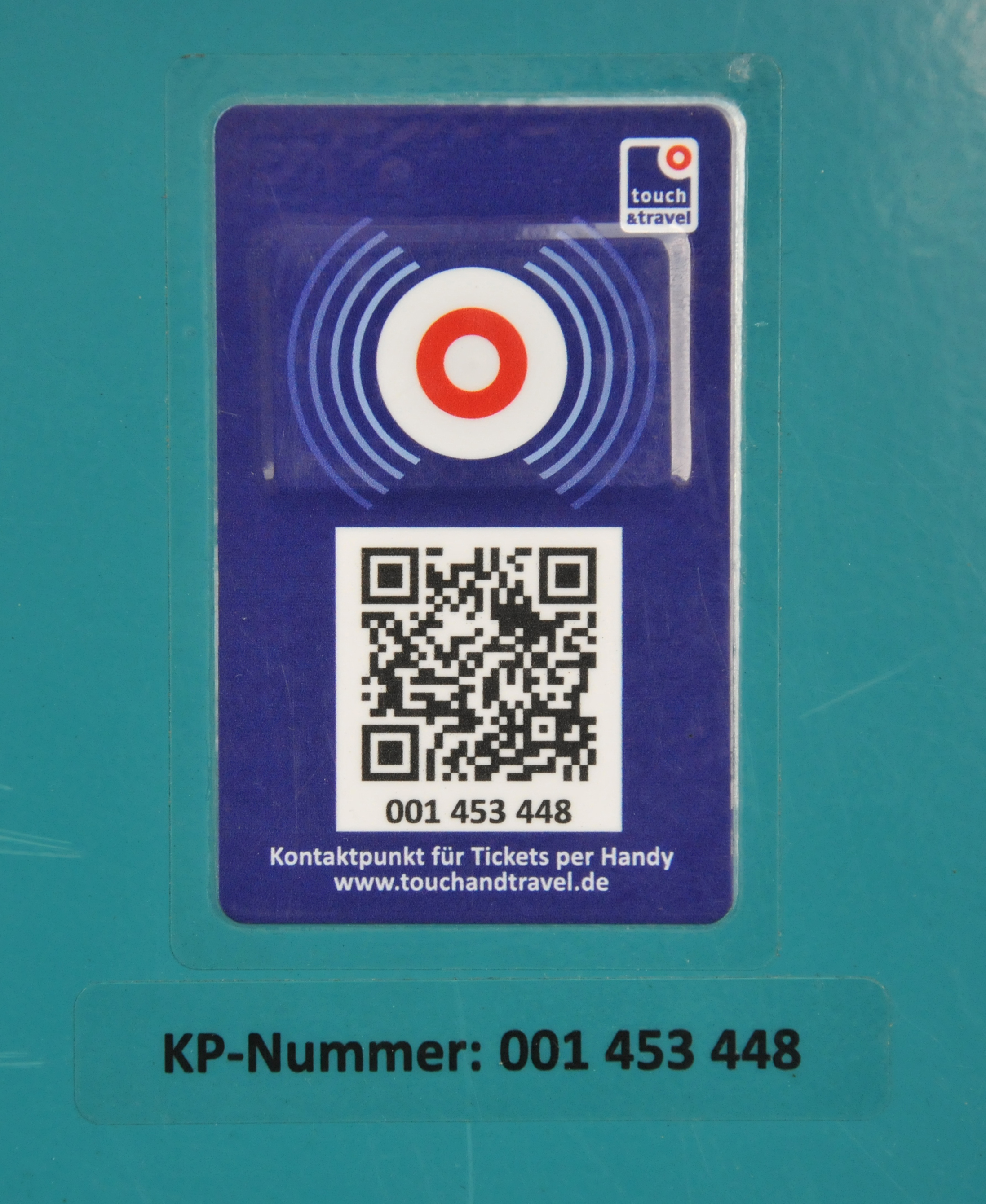 DB Touch-point kaartlezer met loctie code van mobile telefoon zoals bij Arriva ingebruik - ter vervanging van gedrukte plaatskaaten.